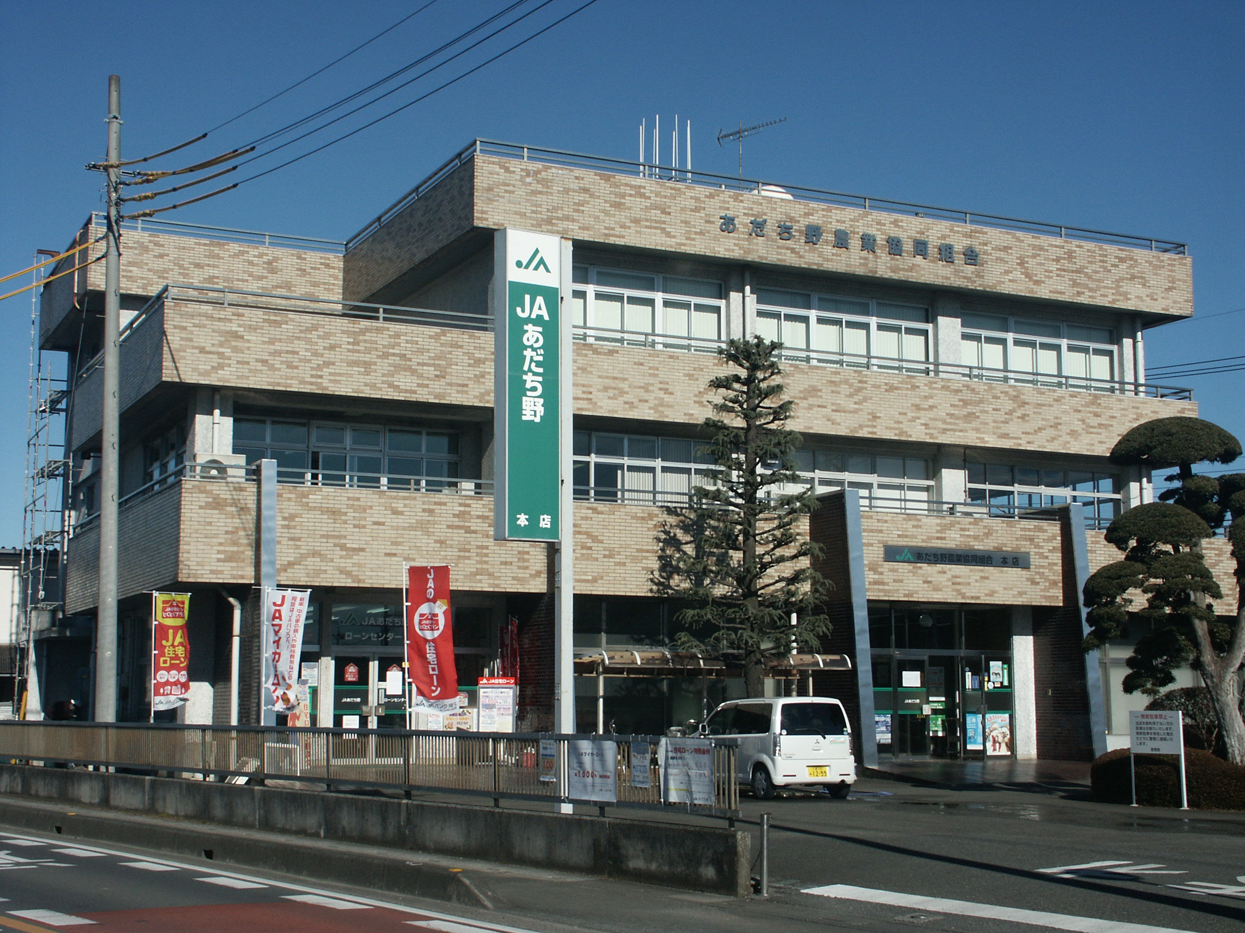 埼玉県上尾市に所在するあだち野農業協同組合本店